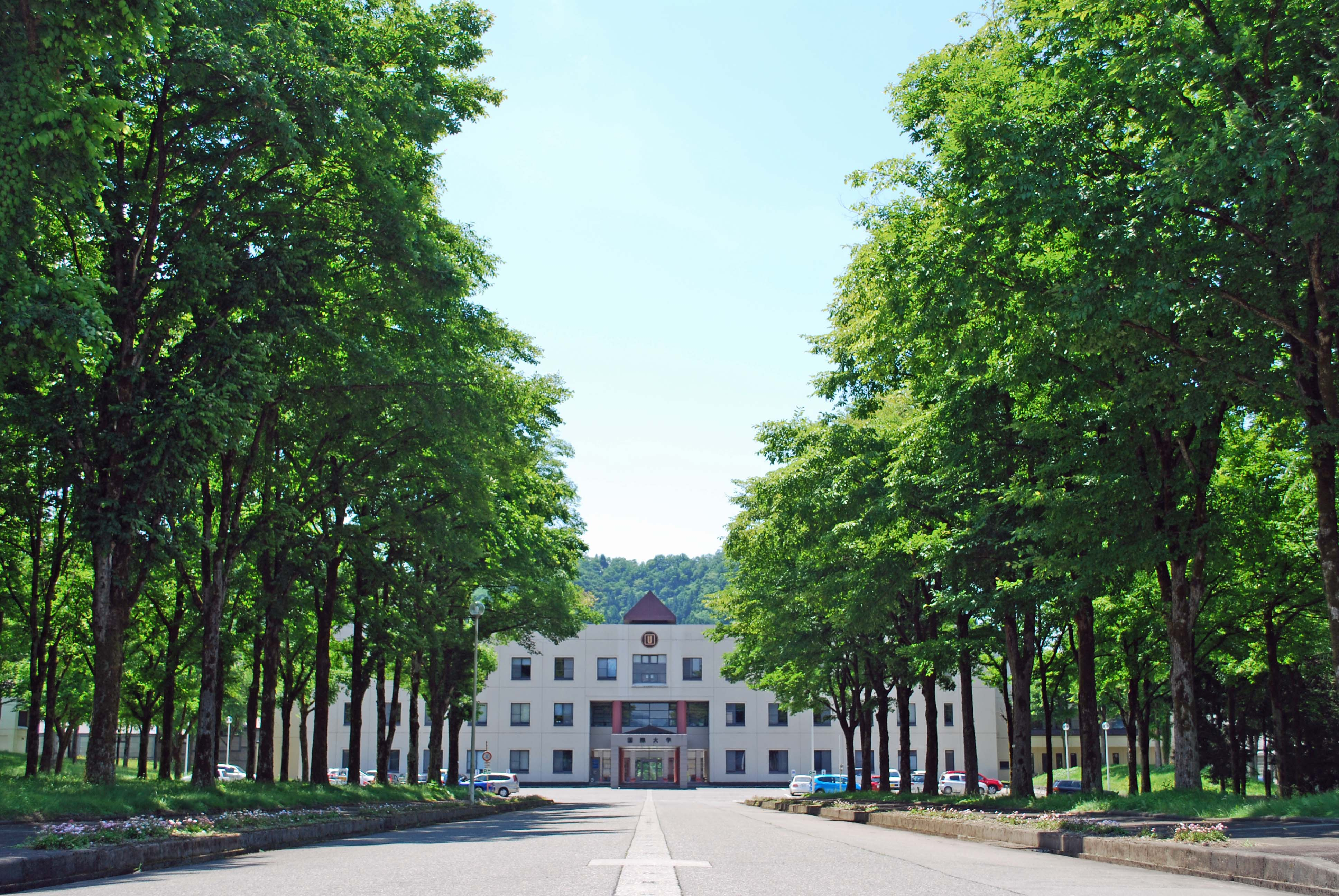 大学正面の景色